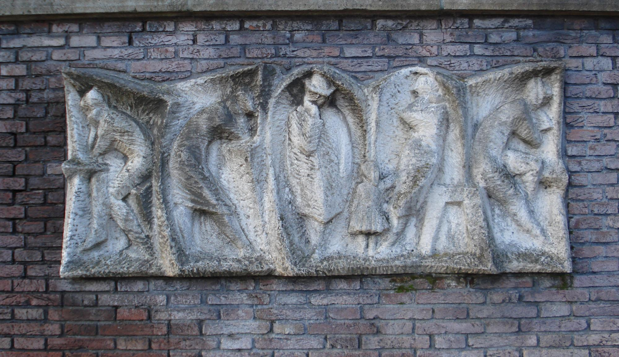 Vlaardingen, Westhavenkade 41. Relief van Jan Hendrik van Borssum Buisman. Vlaardingen/The Netherlands.